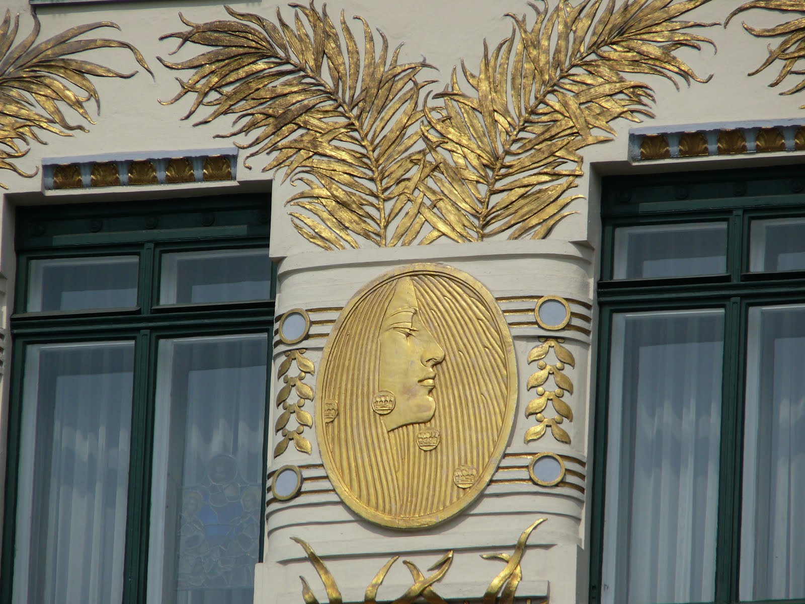 Linke Wienzeile 38